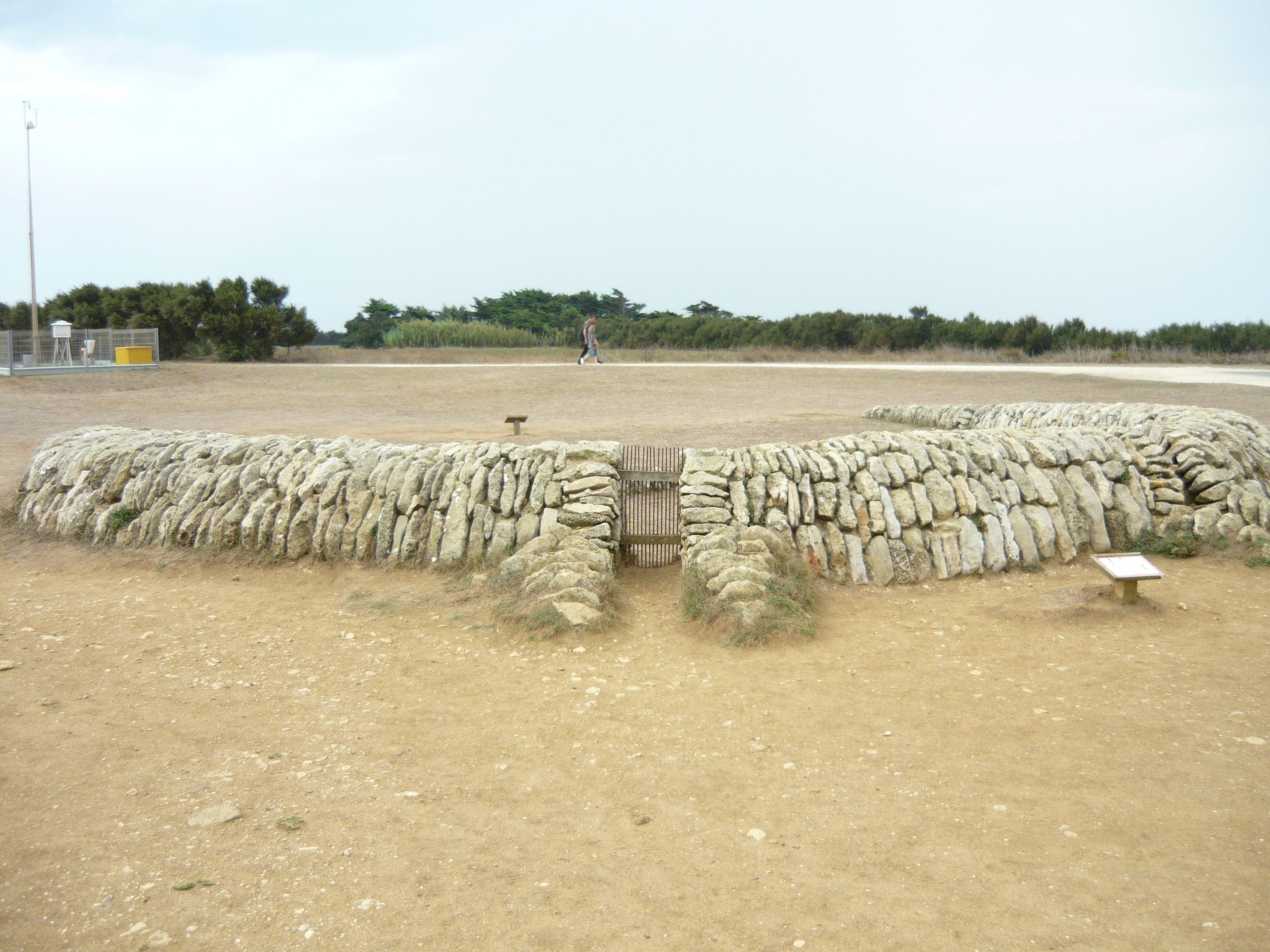 Écluse à poissons du phare de Chassiron face à l'océan